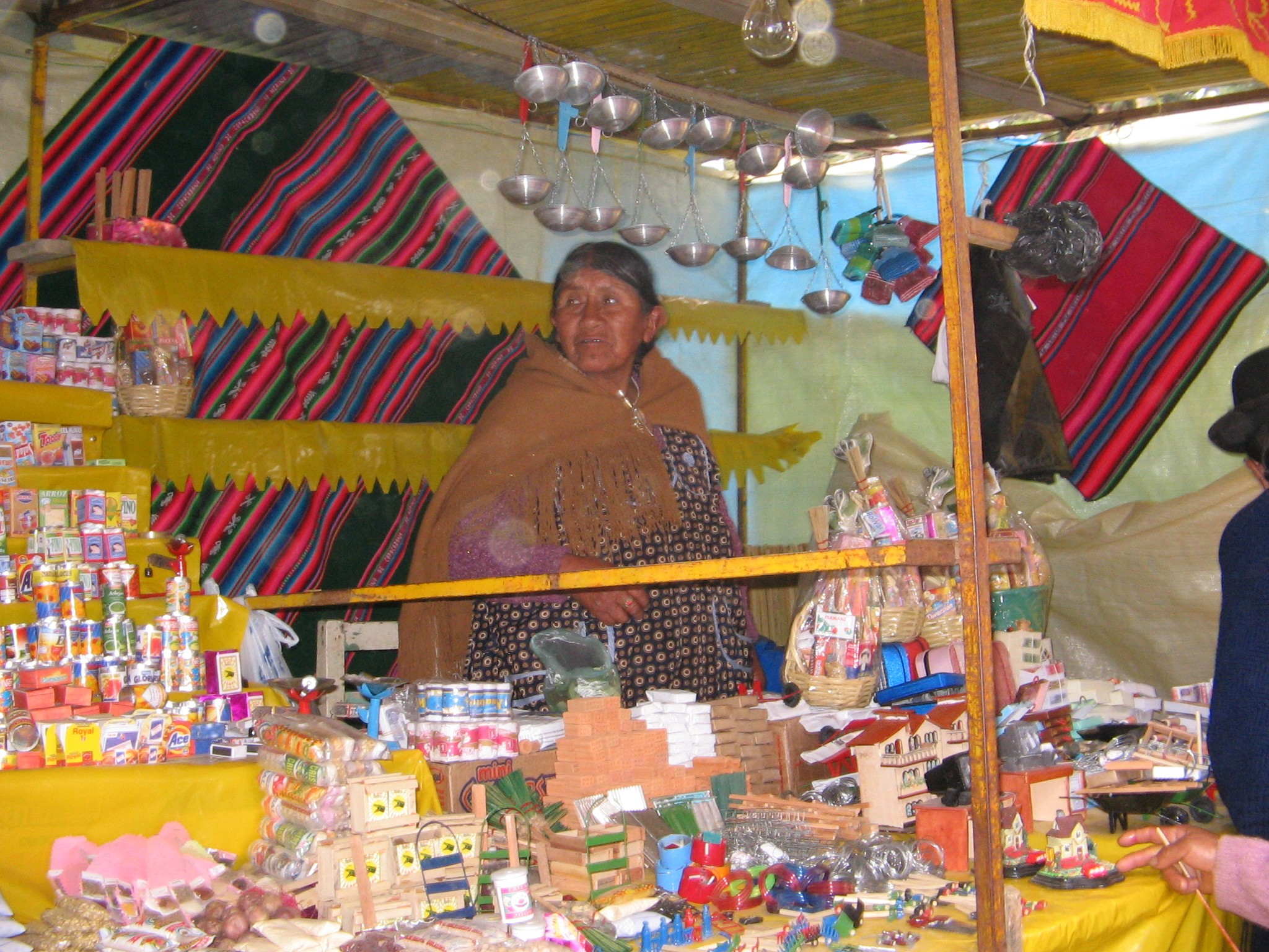 Vendedora de miniaturas en la feria de Alasita, en La Paz, Bolivia en la feria de 2008